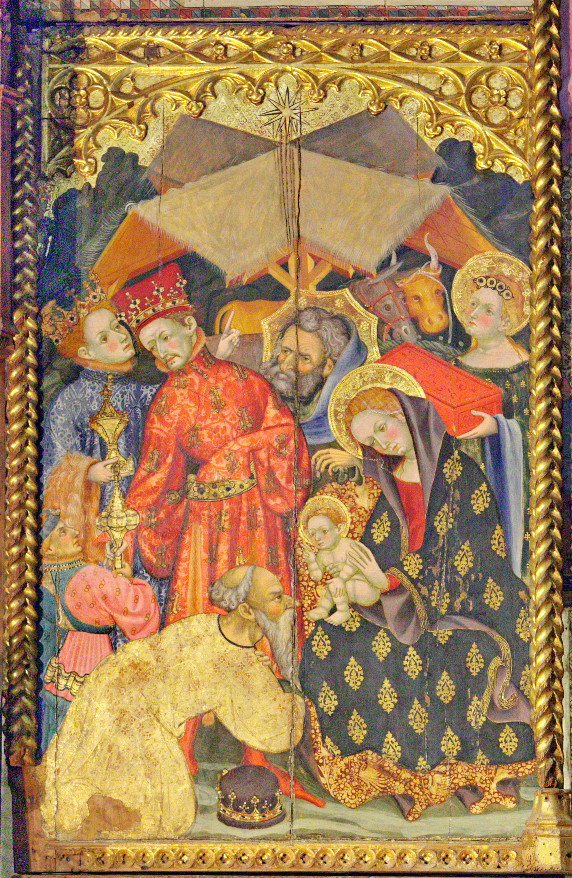 Taula de l'Adoració dels Reis Mags de l'antic retaule gòtic del Monestir de Santes Creus. Actualment està muntat sobre una nova estructura formant un retaule més petit a la catedral de Tarragona